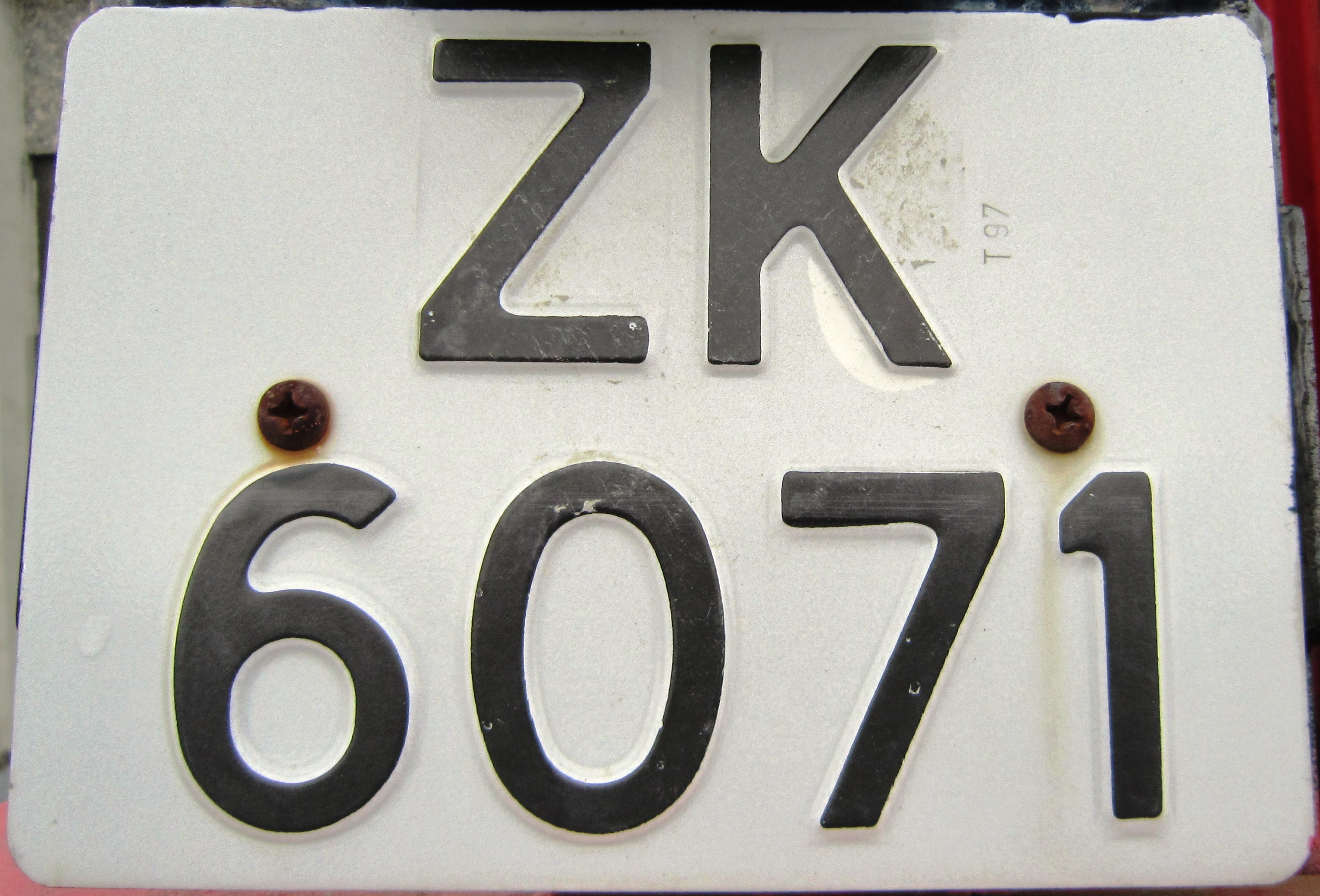 Noorwegen kenteken motorfiets